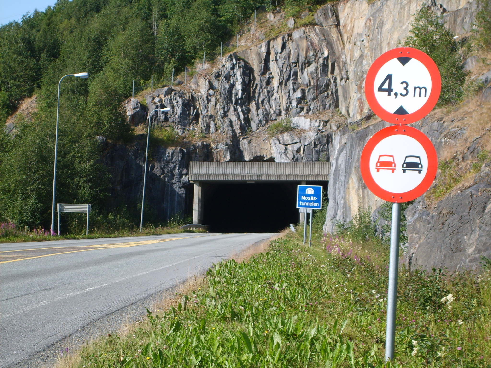 Tunnel under mosåsen